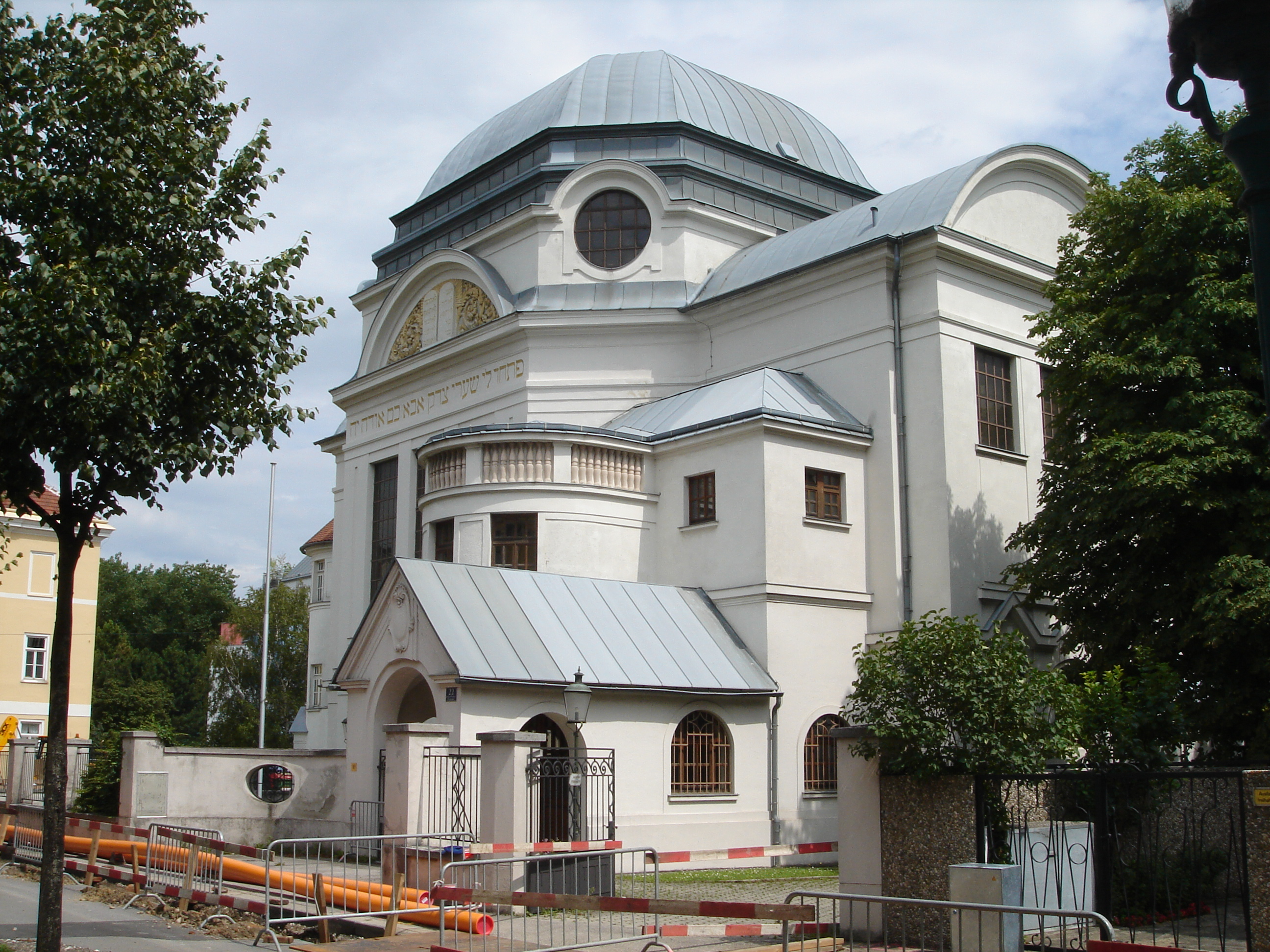 Die ehemalige St.Pöltner Synagoge